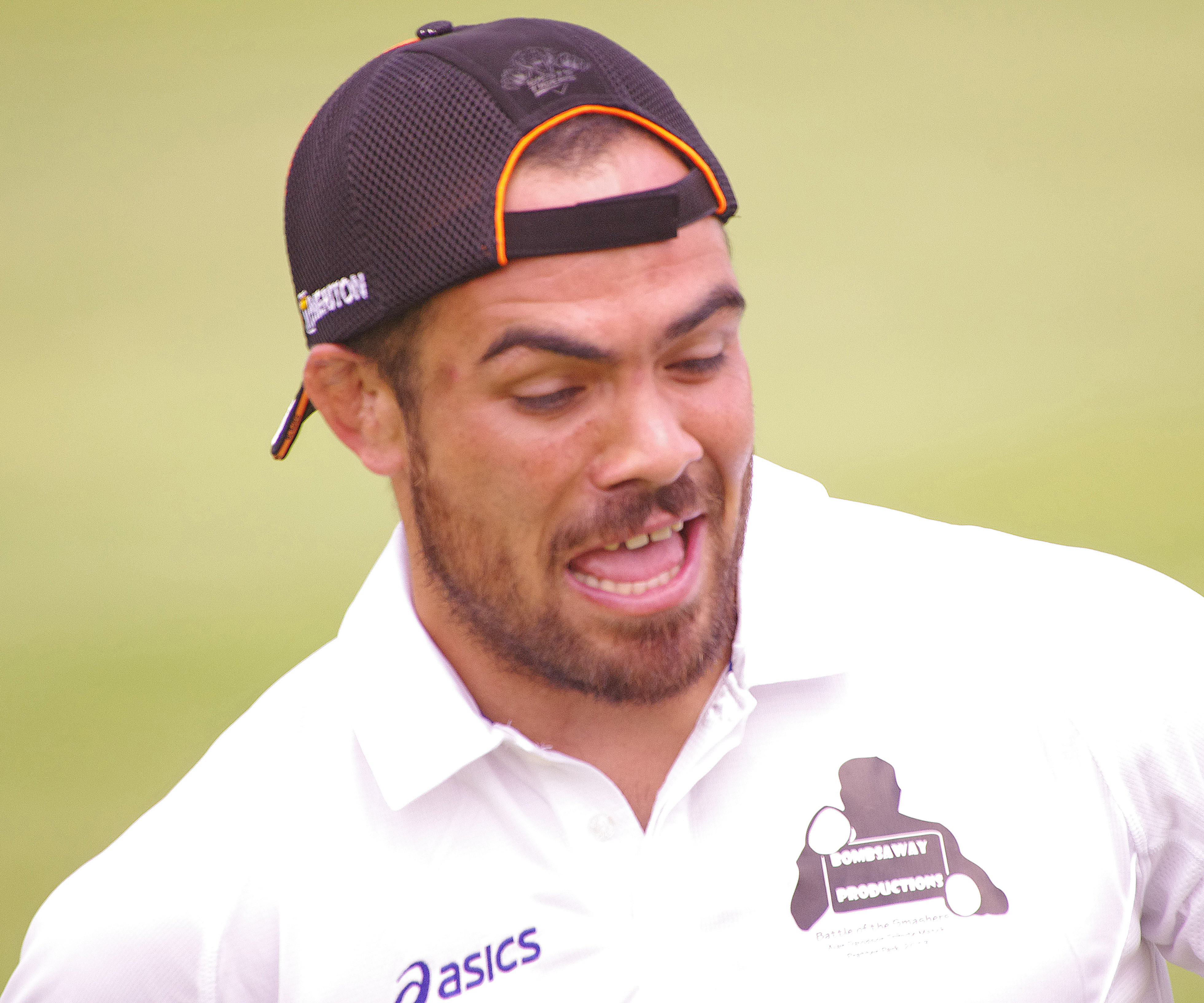 DENE HALATAU